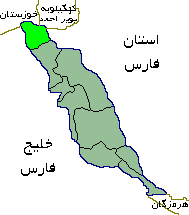 موقعیت شهرستان دیلم در استان بوشهر جنوب ایران.